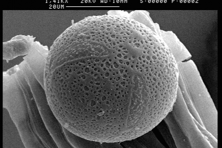 Lepismium lumbricoides forma aculeatum Pollen